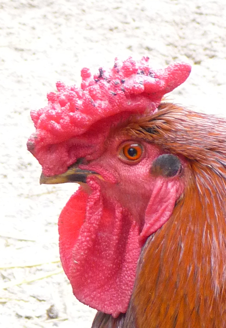 Männliches Haushuhn (Gallus gallus domesticus)